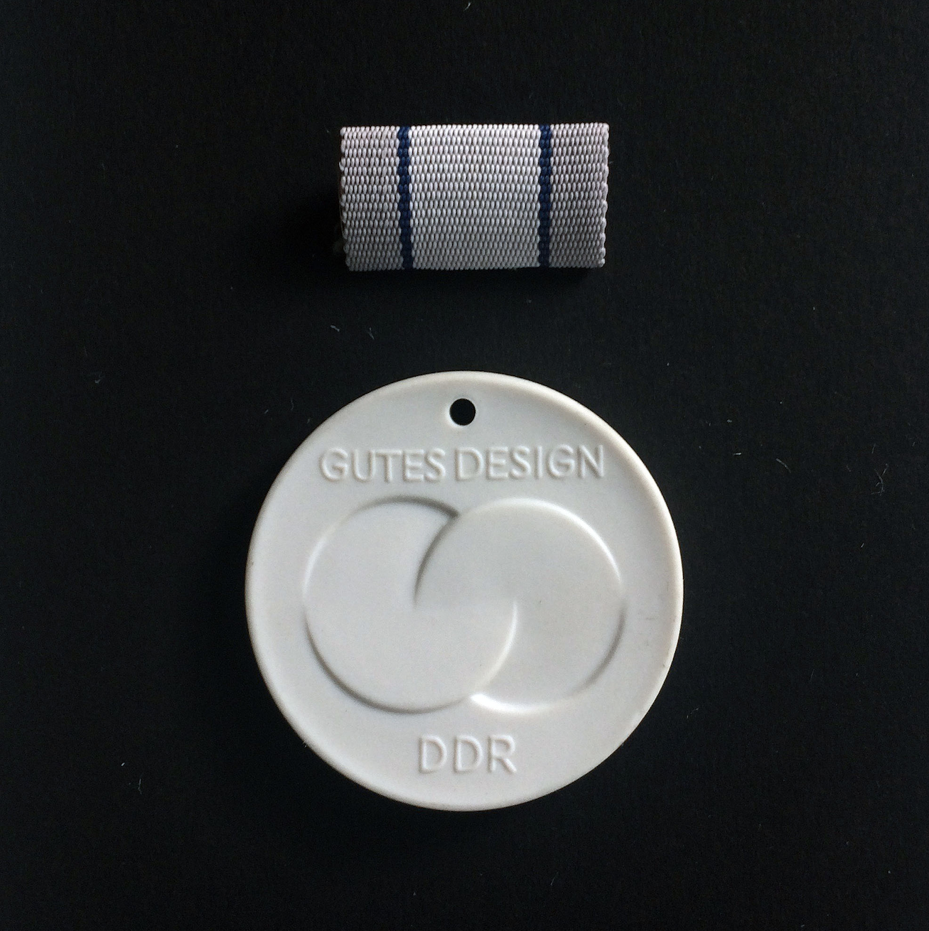 Medaille „Gutes Design“, Kleine Ausführung mit Ordensspange, Rückseite, DDR, 1980, Meißner Porzellan